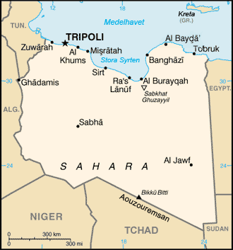 Libya